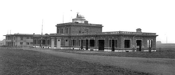 Aéroport d'Haren en 1929. Dans le fond, à gauche, l'Avia-Palace qui était le buffet et le restaurant de l'aérodrome